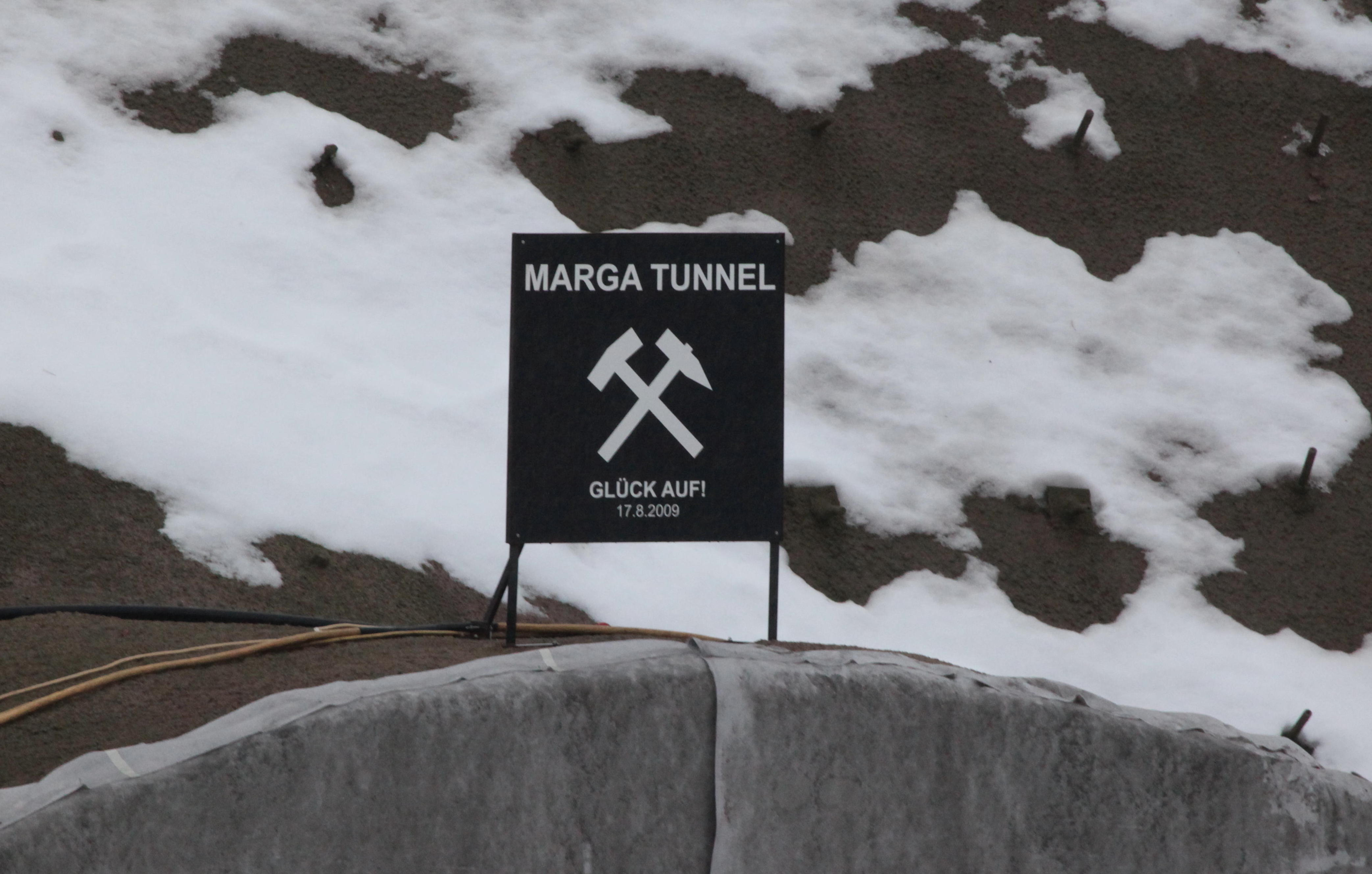 Tunnel Reitersberg, im Landkreis Coburg, Nordportal